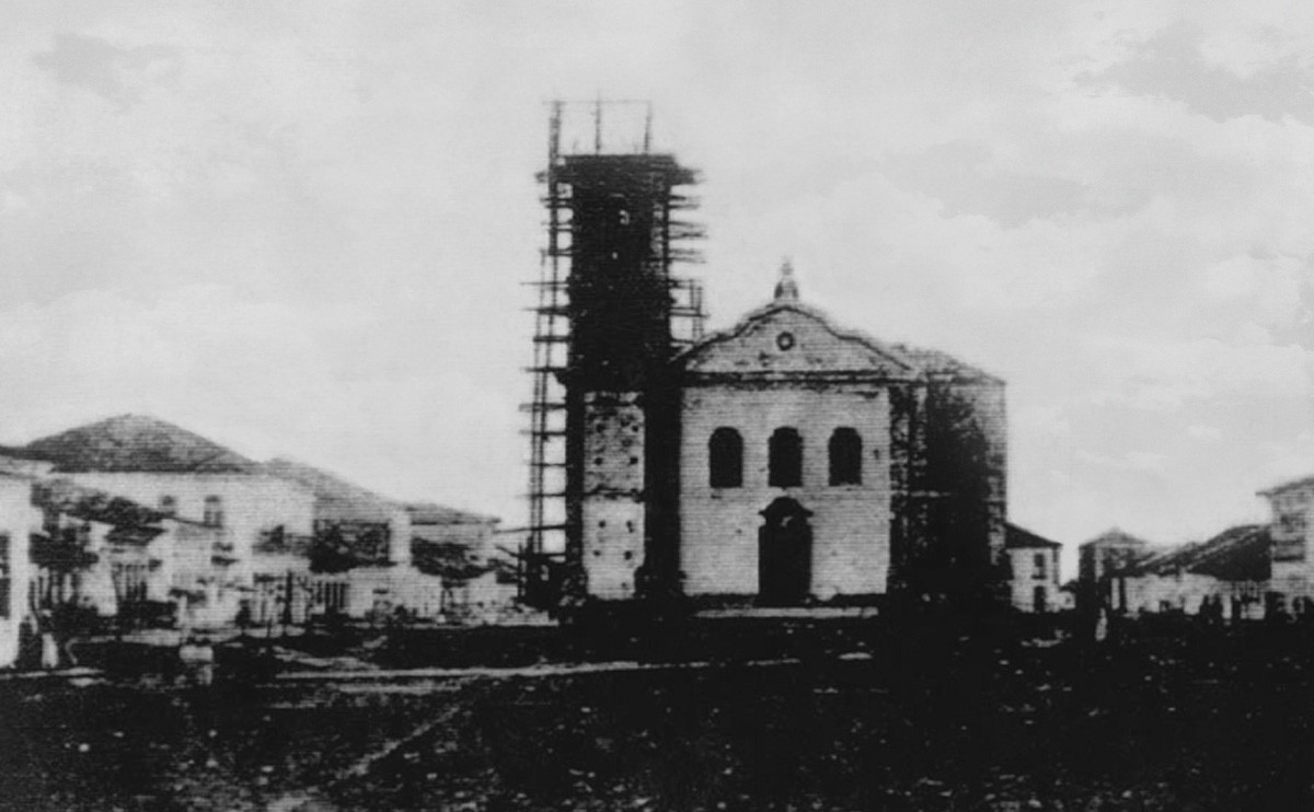 Iniciada em 1780, esta igreja foi concluída, em estado de receber a bênção no dia 27 de julho de 1856, e no dia 8 de agosto do mesmo ano, foram trasladas as imagens da antiga igreja para a nova Igreja Matriz. Até esta data a Matriz de Iguape, estava sob invocação de Nossa Senhora das Neves, mas por respeito essa nova matriz, foi por lei n° 11 de 3 de março de 1858 declarado que a Igreja Matriz desta paróquia ficasse sob a invocação do Senhor Bom Jesus de Iguape. No ano de 1956, elevada à categoria de Basílica. Nela está a imagem do Bom Jesus de Iguape e Nossa Senhora das Neves, padroeiros de Iguape, que atrai milhares de romeiros todos os anos, entre os dias 28 de Julho e 6 de Agosto.